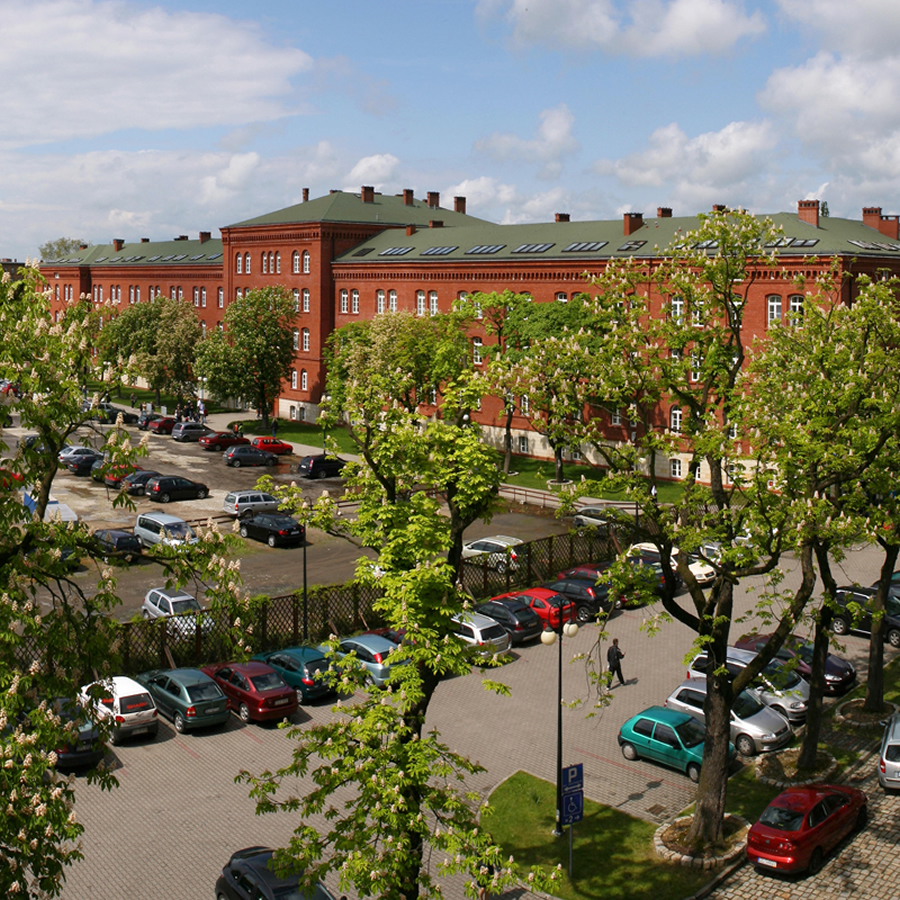 Legnica, ul. Sejmowa 5a - widok kampusu PWSZ (dawny plac musztr kompleksu koszarowego)